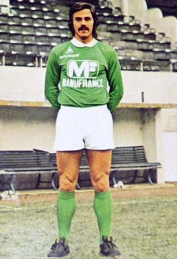 Christian Lopez en 1973, 'Ageducatifs football 1973 - 1974', Panini figurina n°236.